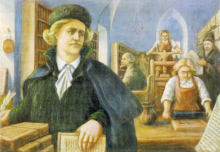 1940-1943 гг. Матэр'ял і тэхніка палатно, алей Памеры 66,5 х 95,5 Месцазнаходжанне Музей старажытнай беларускай культуры Інстытута мастацтвазнаўства, этнаграфіі і фальклору НАН Беларусі